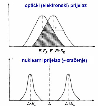 Rezonancijska apsorpcija 2